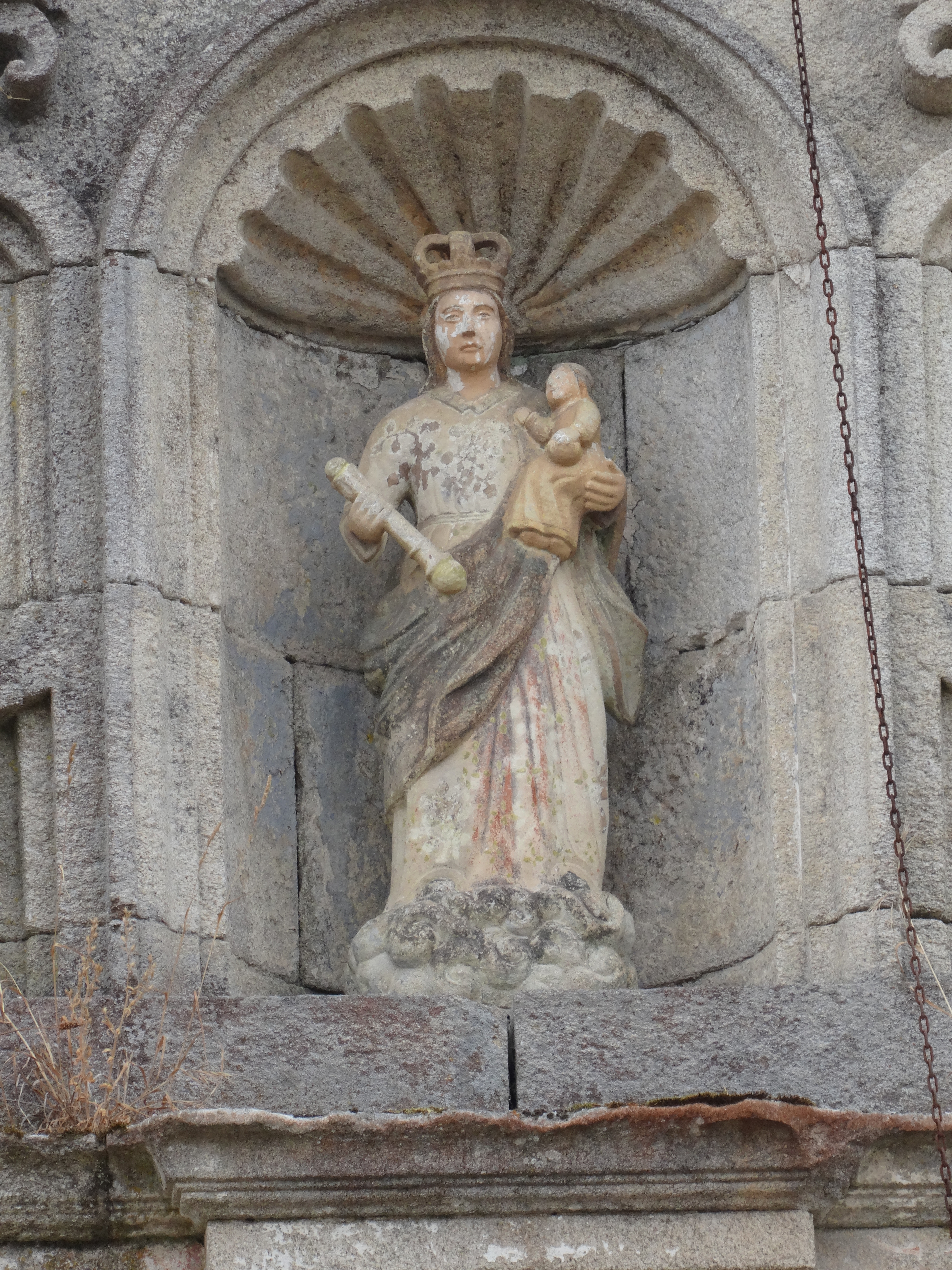 Ver título.